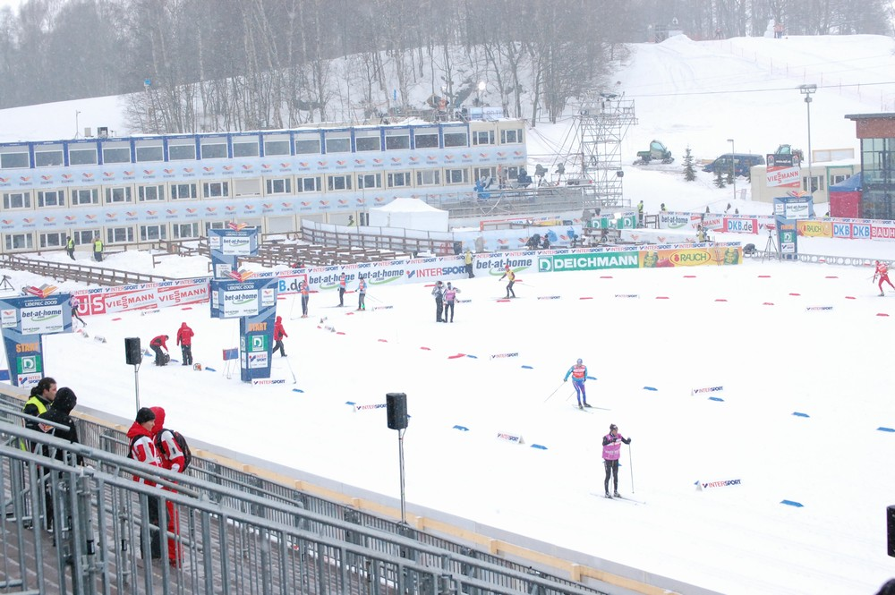 Ski 2009 Liberec - Vesec